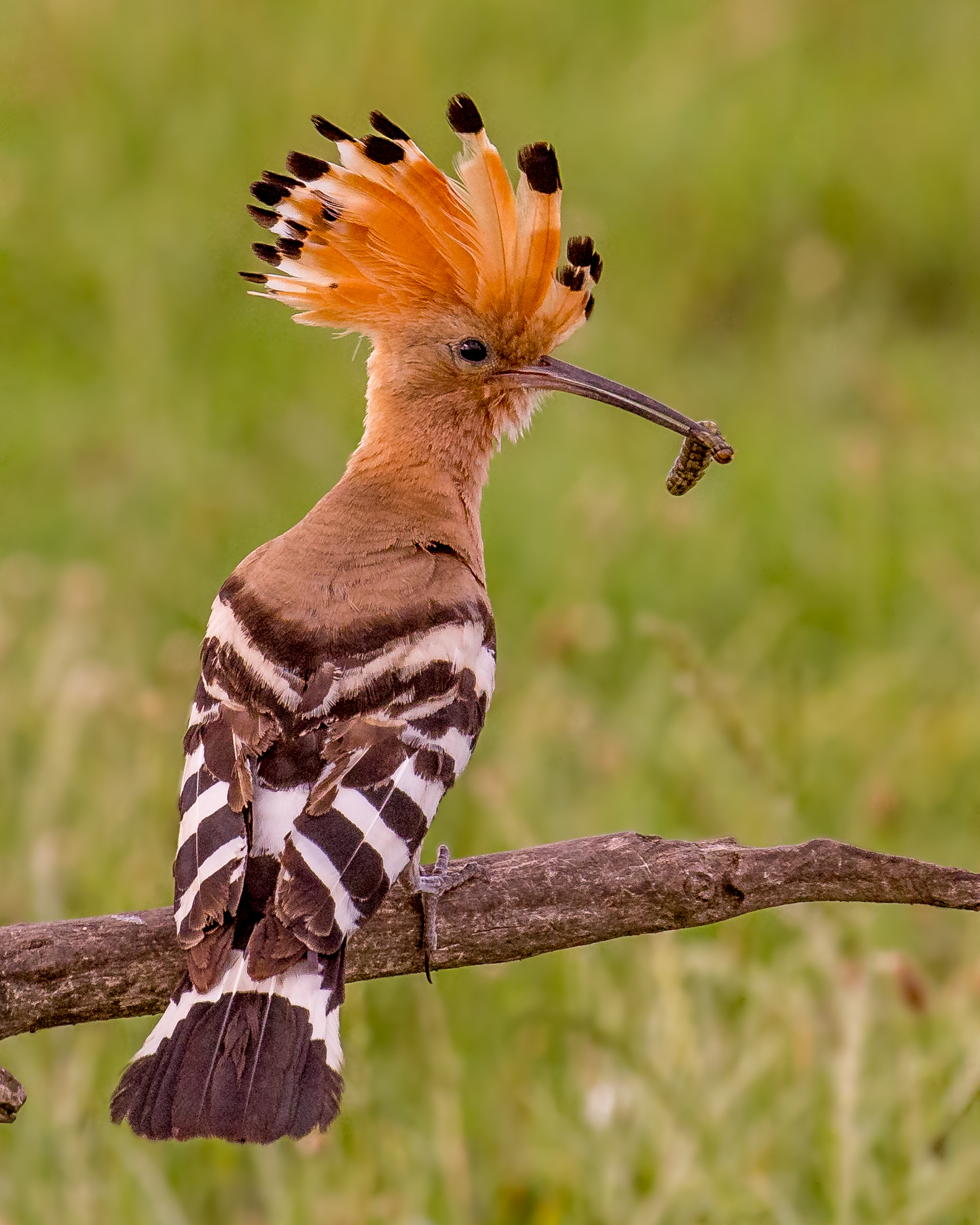 Taken in Hungary!